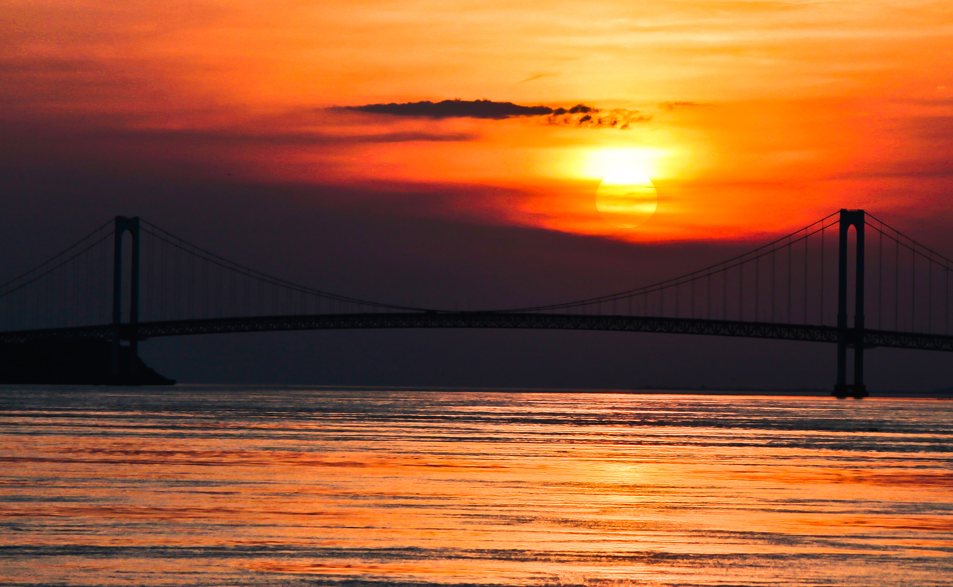 Atardecer sobre el río Orinoco pasando por el puente.